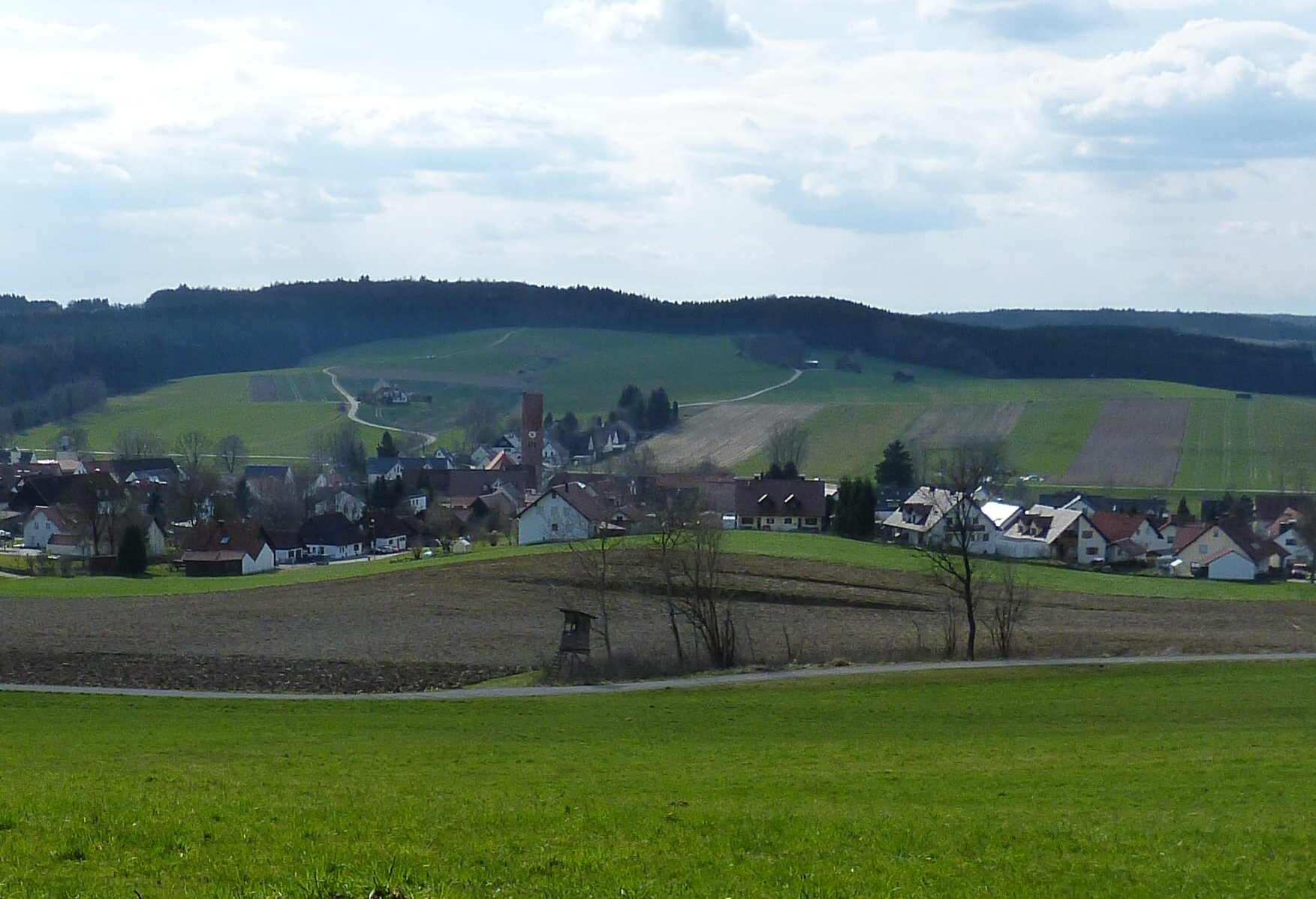 Willmatshofen